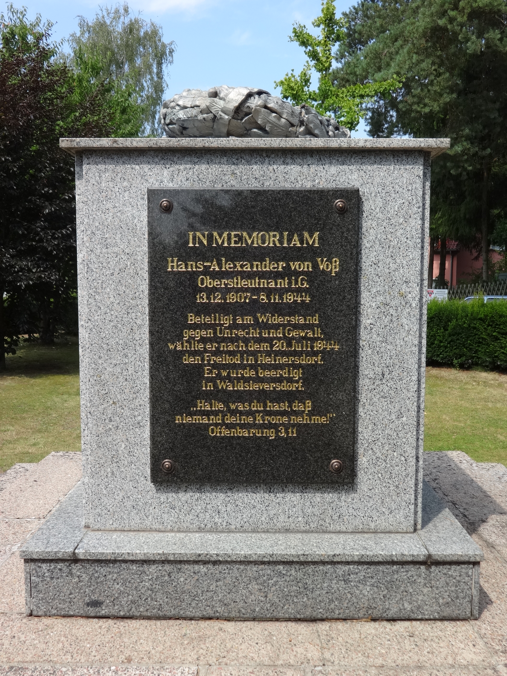 Denkmalgeschützter Gedenkstein „Den Opfern der Kriege“ in der Dahmsdorfer Straße in Waldsieversdorf, Brandenburg